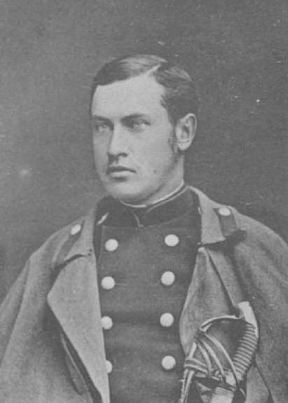 Михаил Александрович Дондуков-Корсаков (1853—1901)